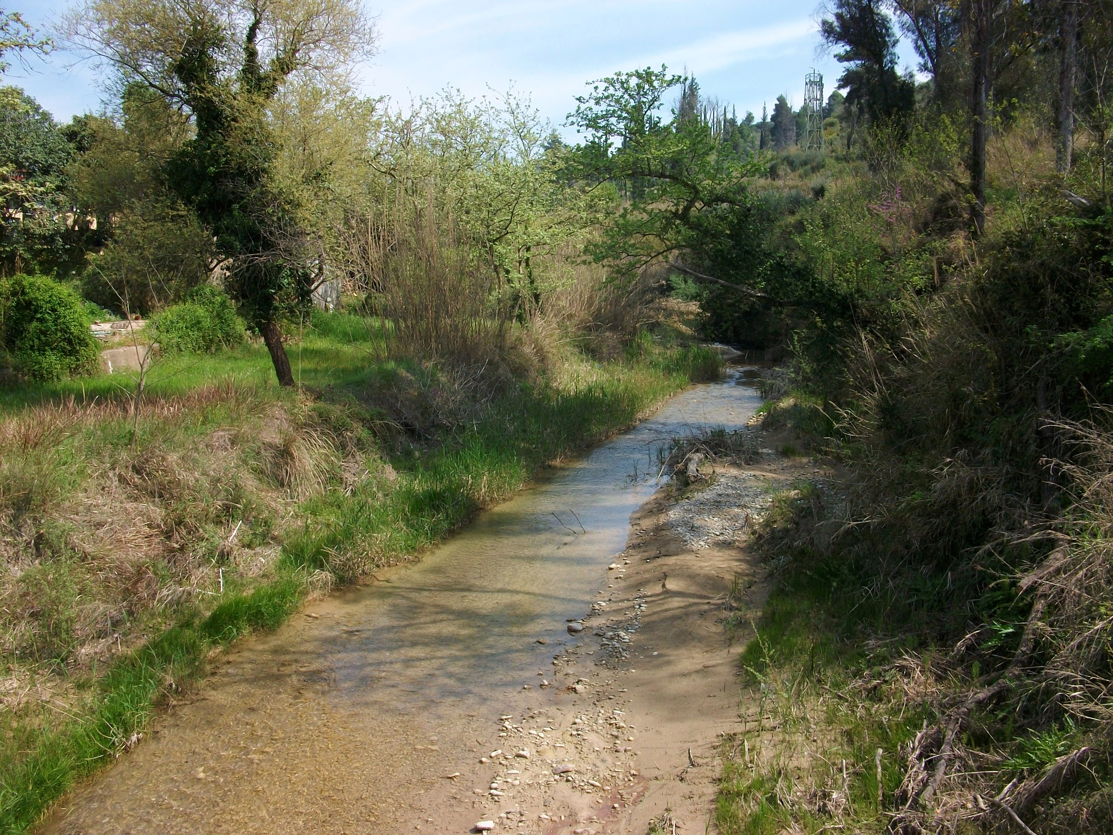 El riu Cladeu (Kladeos) al seu pas per Olímpia.